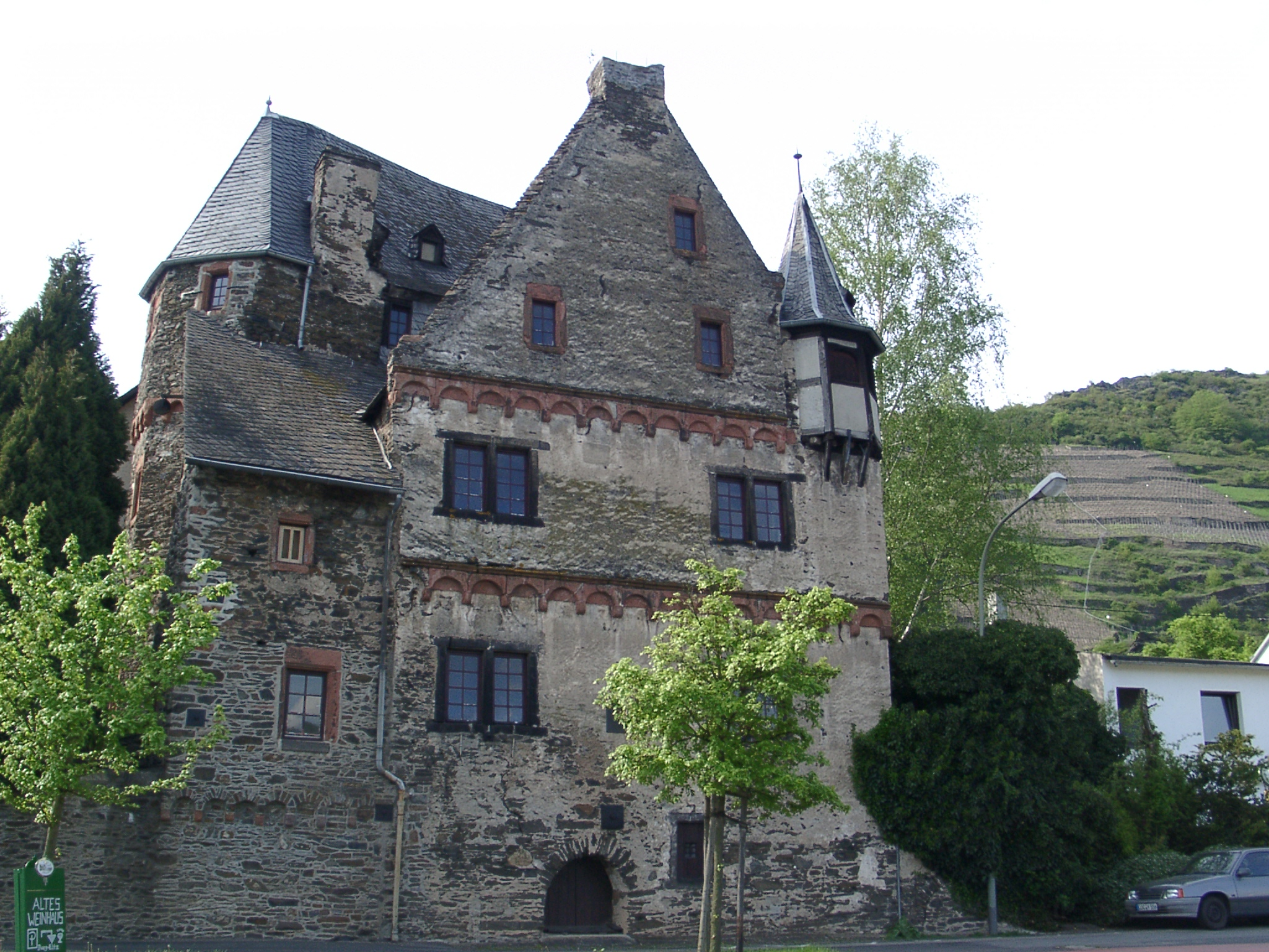 Burghaus in Karden - selbst fotografiert (Klaus Graf) 30.4.2005